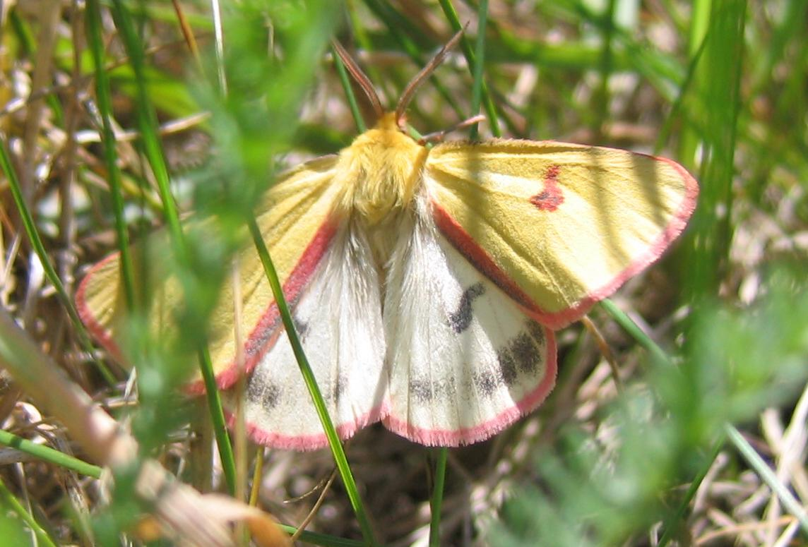 Rotrandbär (Diacrisia sannio Linnaeus, 1758), Hinterflügel zeigend, Groß Machnow, Brandenburg